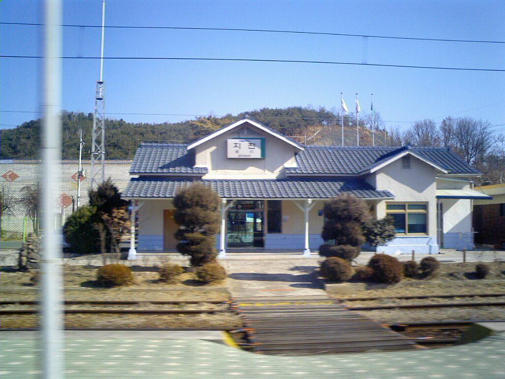 京釜線枝川駅